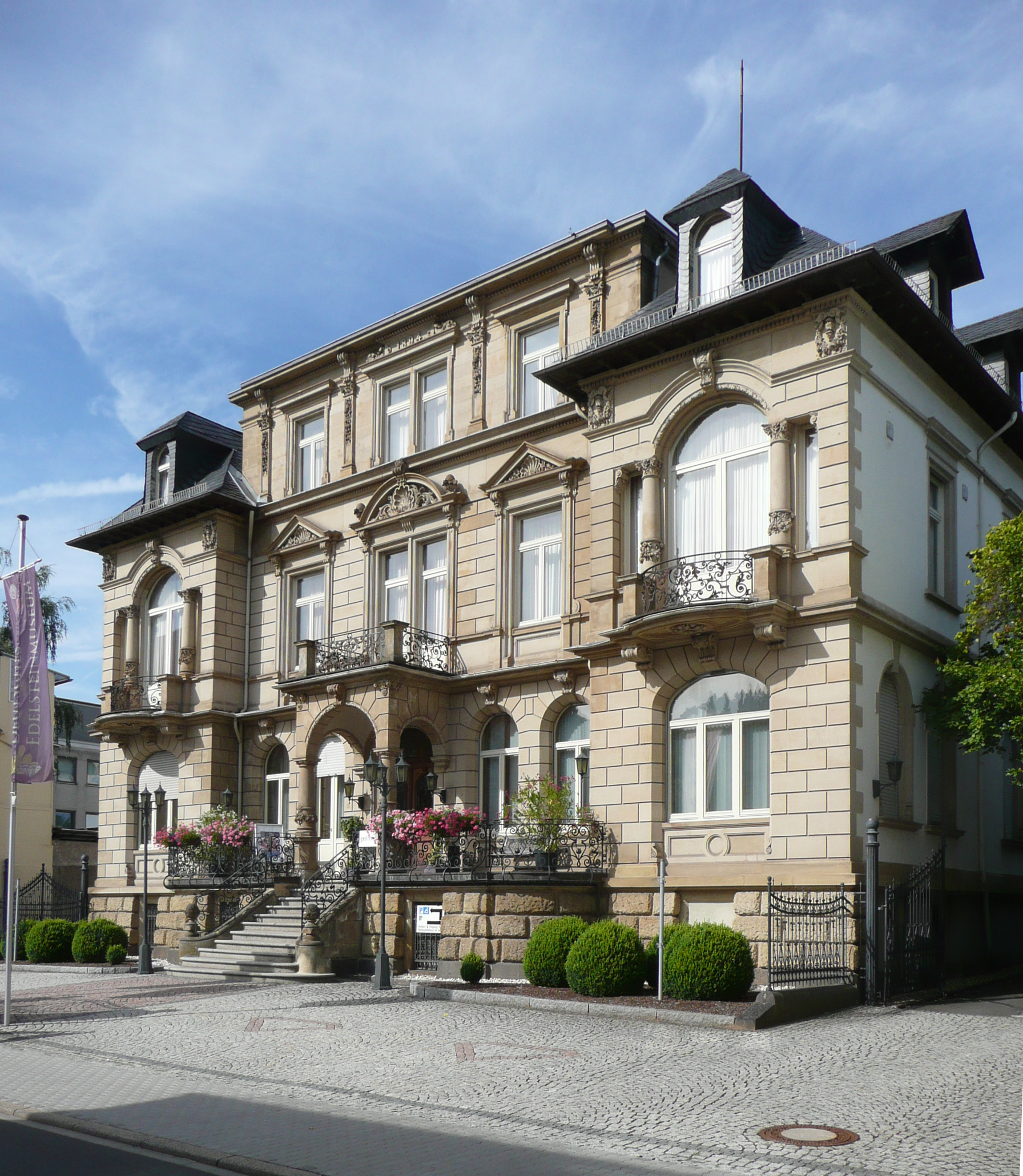 Hauptstrasse 118, Neurenaissance Villa von 1894, jetzt Deutsches Edelsteinmuseum